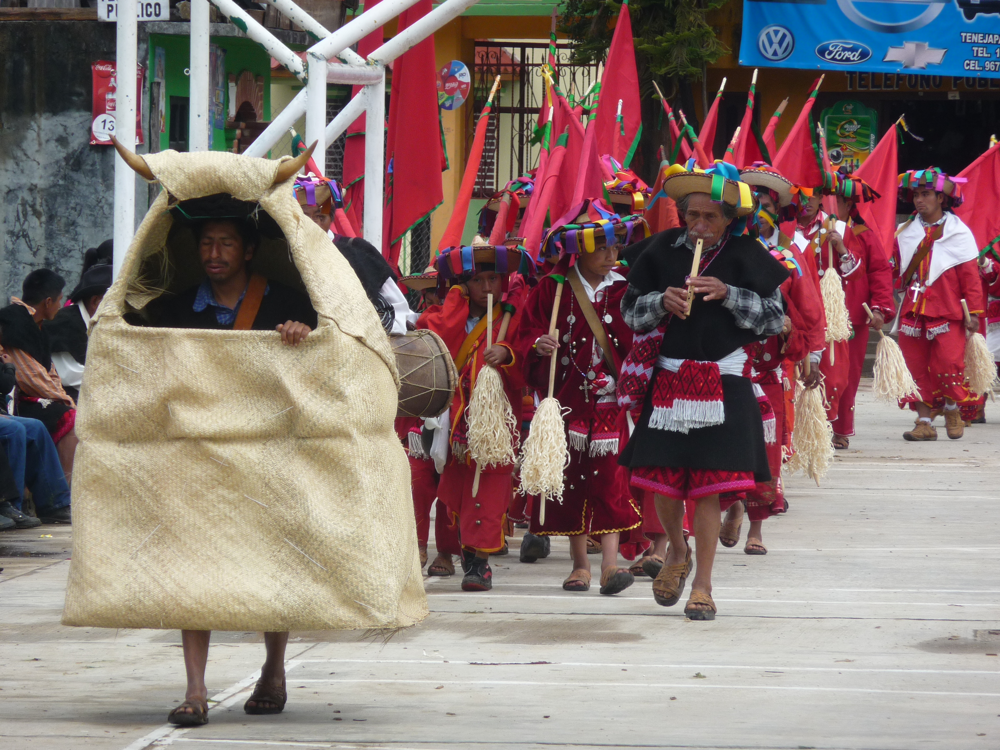 Photo du Carnaval de Tenejapa, Chiapas, Février 2011